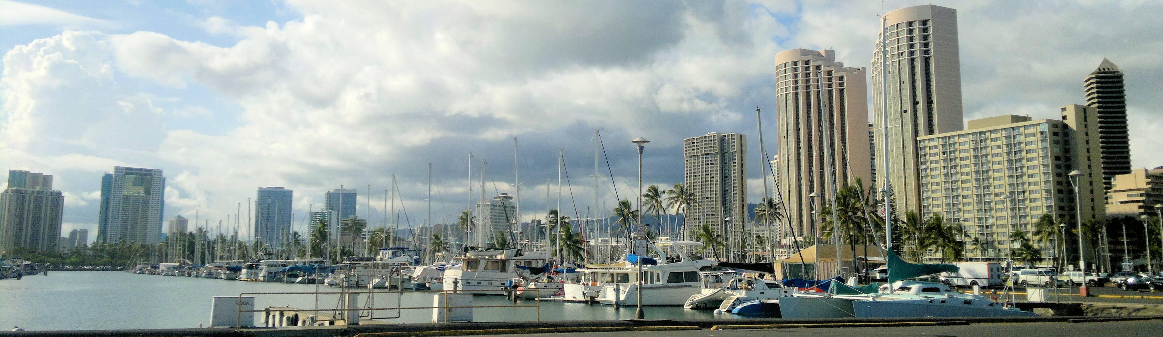 Der Yachthafen von Waikiki